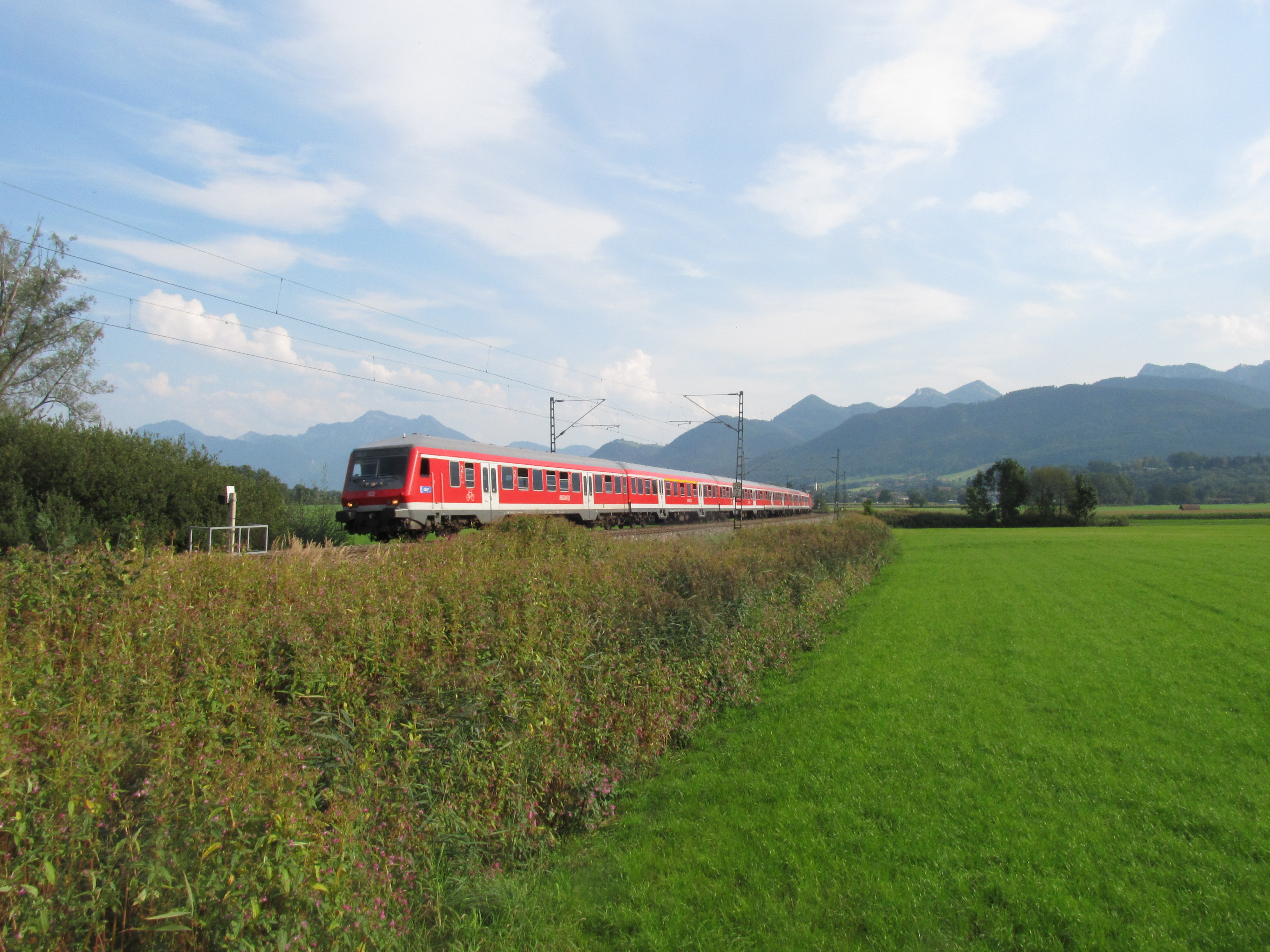 Regional-Express bei Bernau am Chiemsee